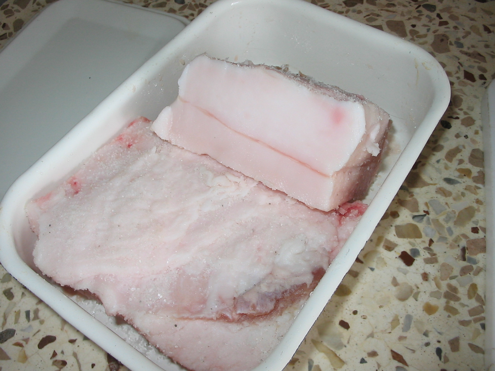 свинне сало солене